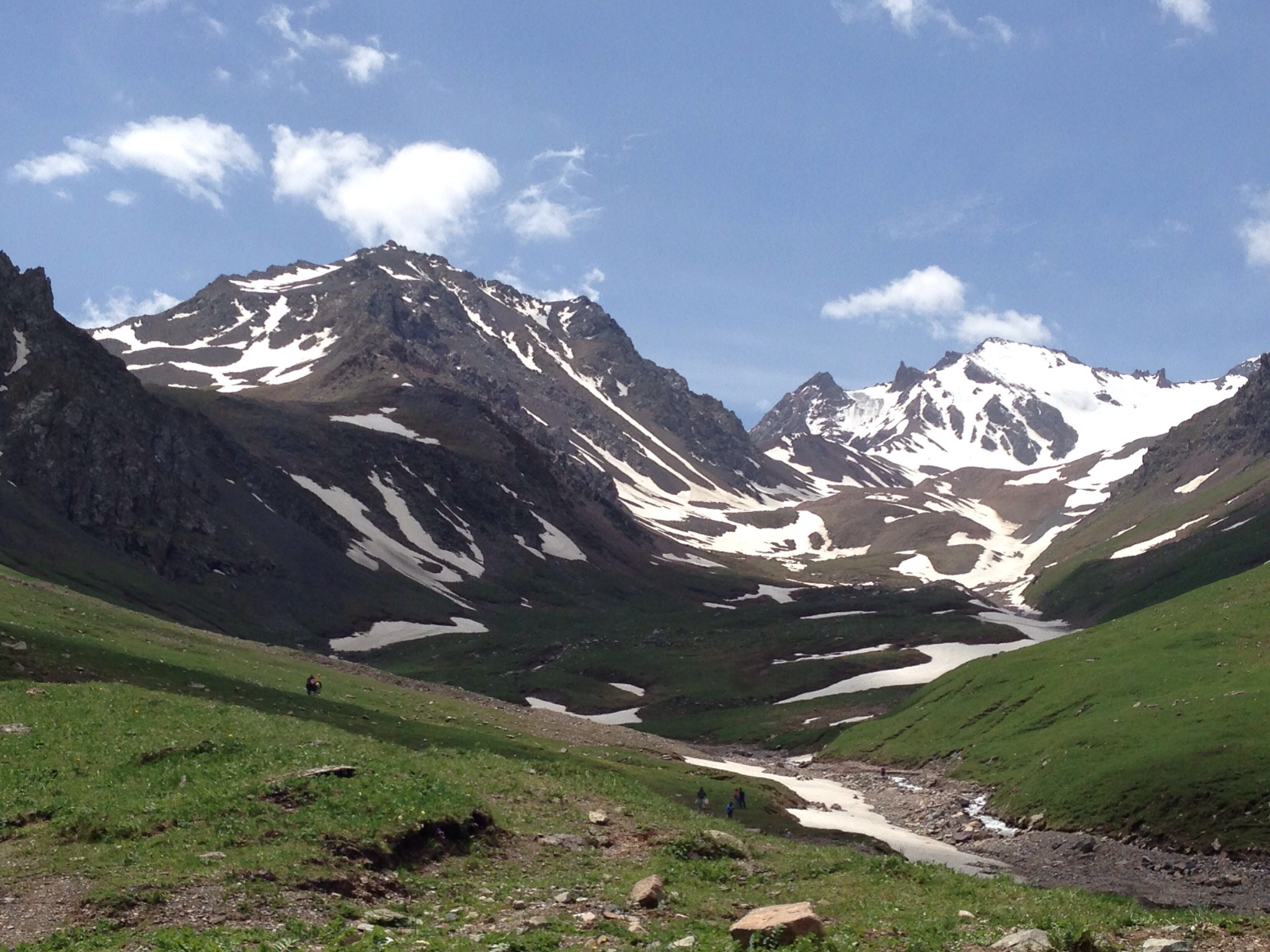 雪莲谷